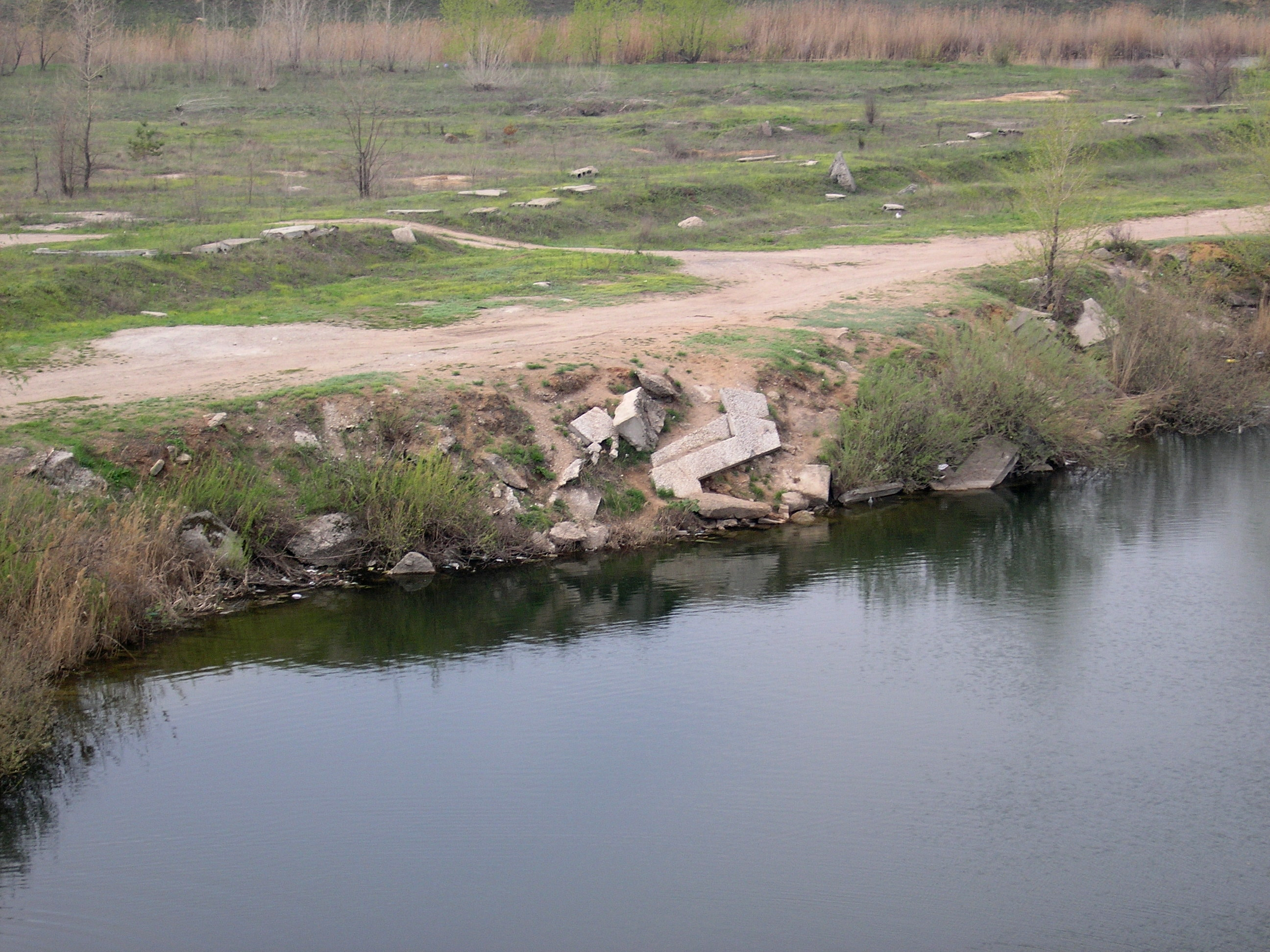 Озеро Пляжное, Тольятти, Россия